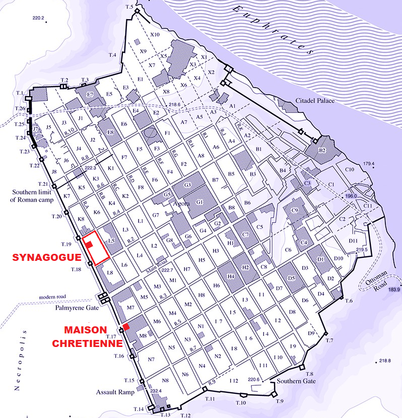 Doura Europos, plan général (image commons modifiée)